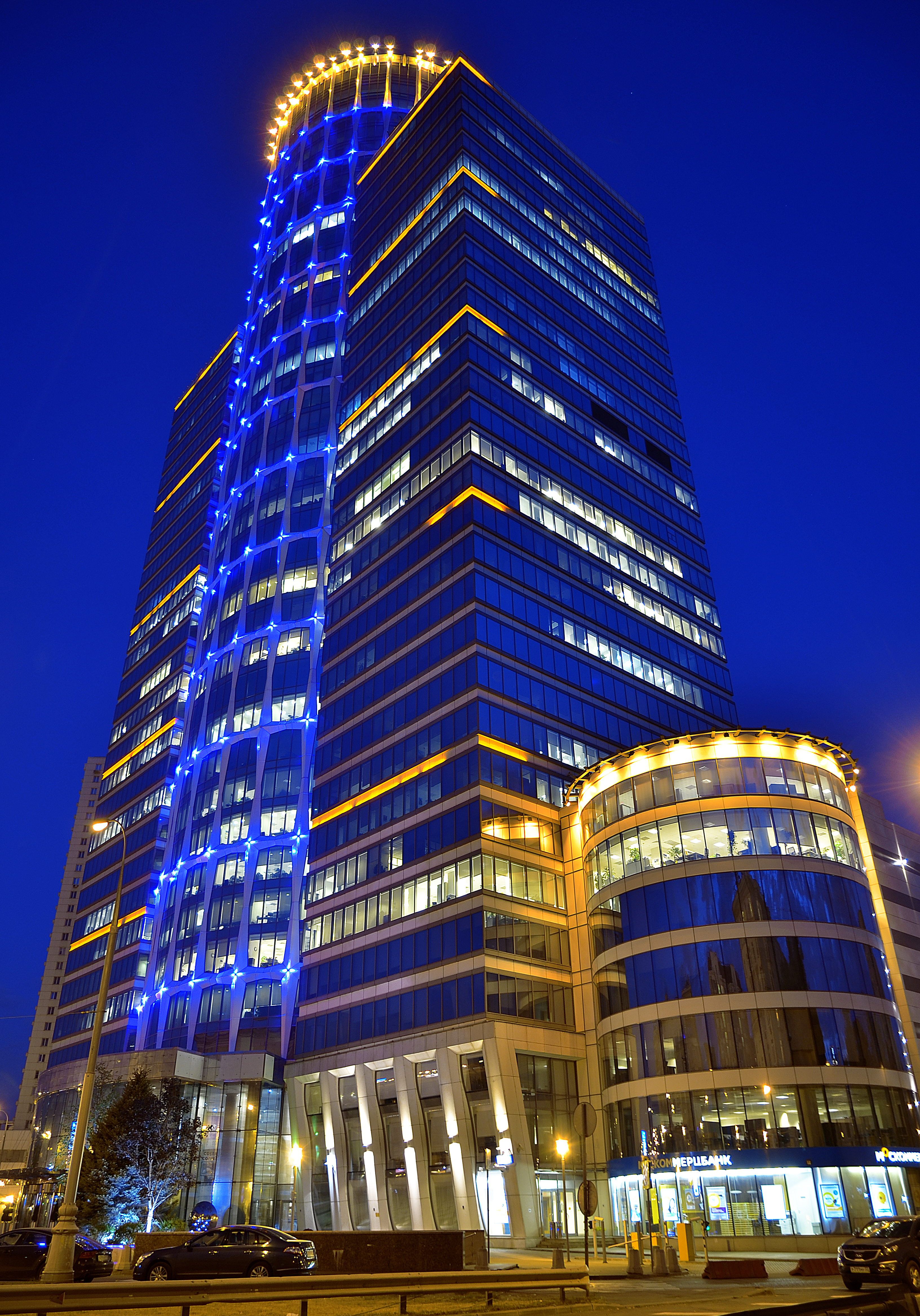 Можно увидеть здесь : You can see here